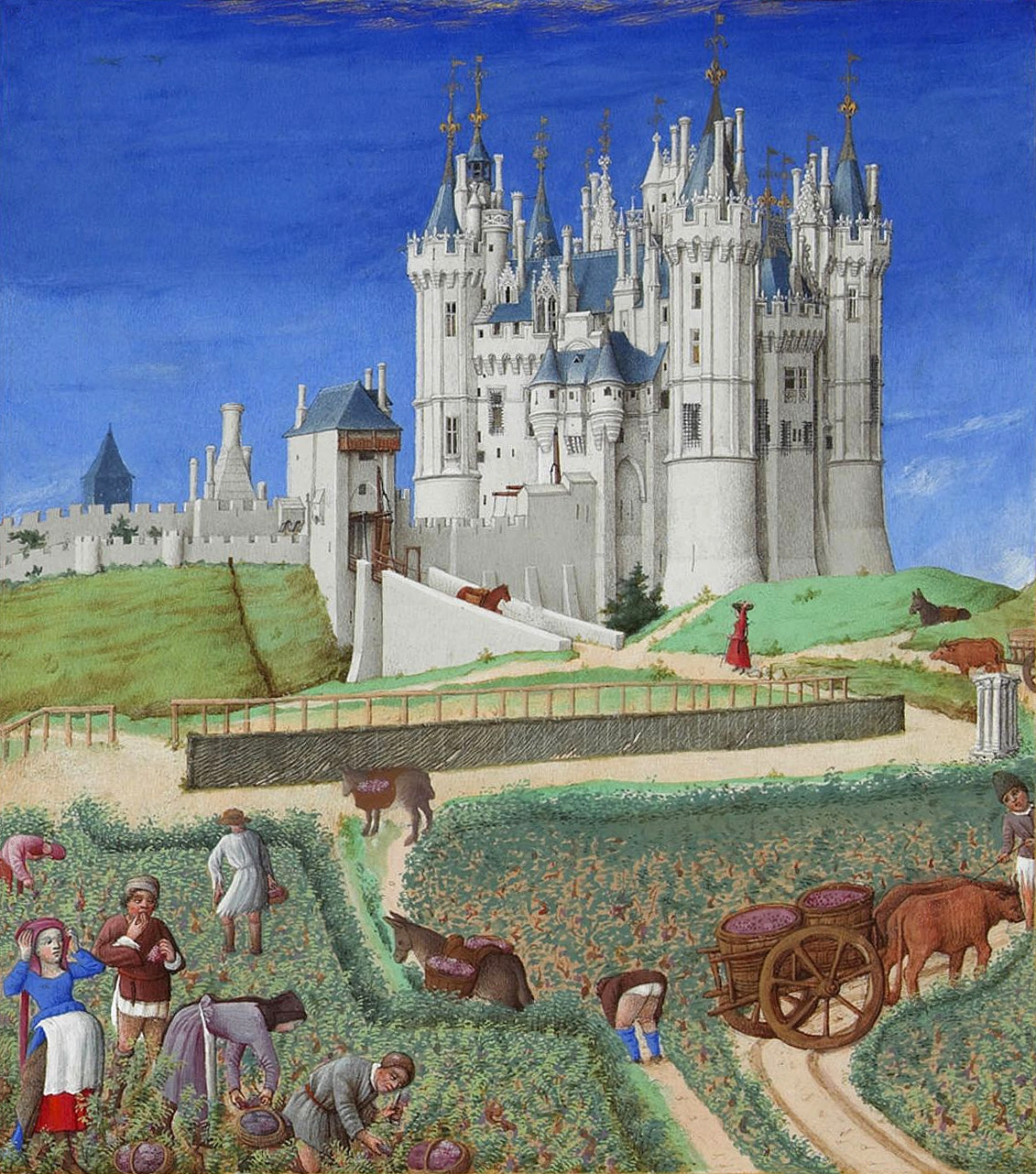 Scène de vendanges au pied du château de Saumur. Septembre, détail, Les Très Riches Heures du duc de Berry, folio 9